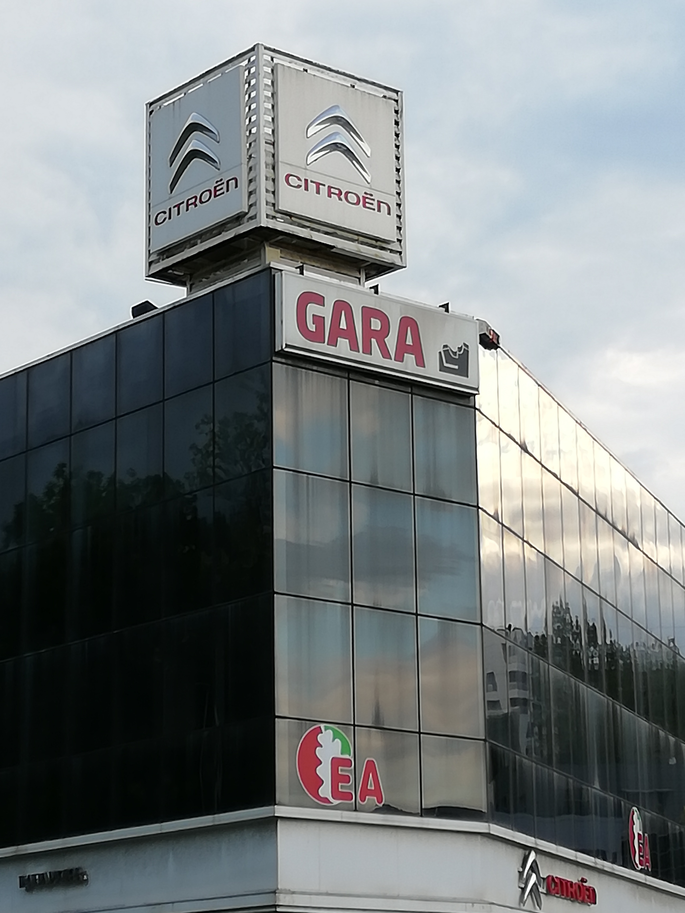 Eraikin honen azken solairuan dago egunkariaren erredakzioa.